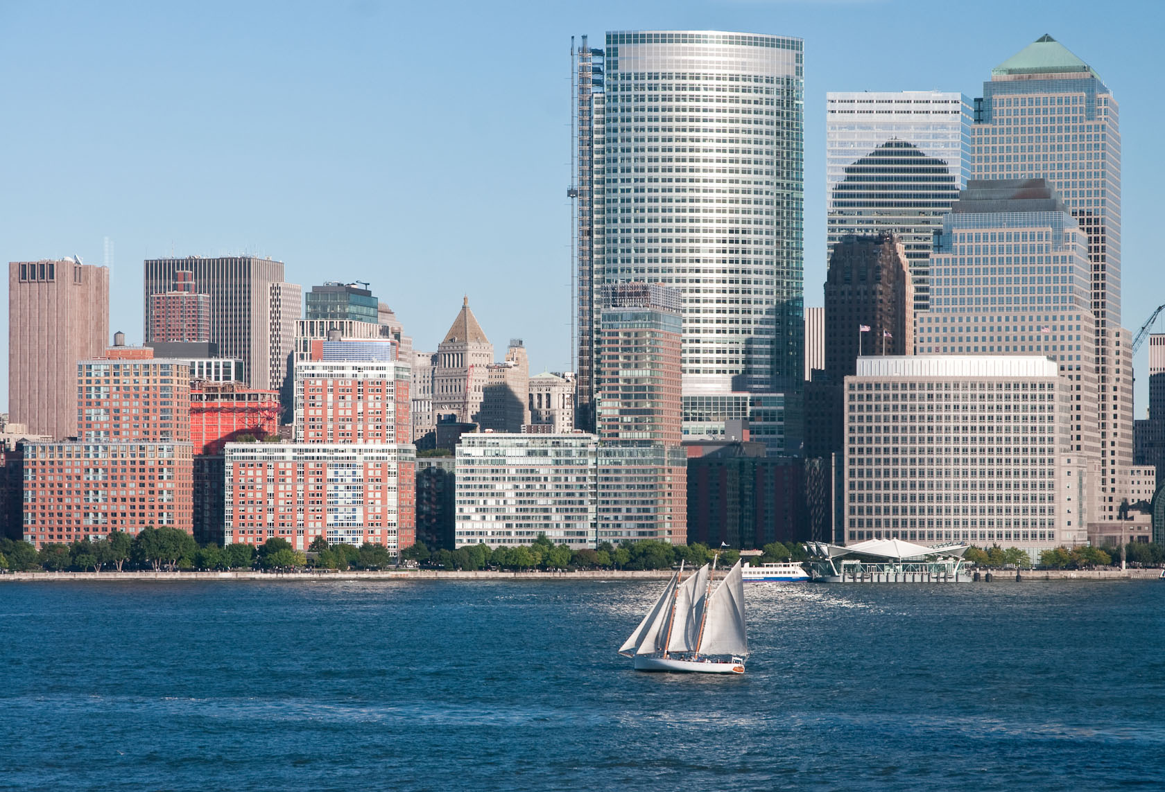 Hudson river sailboat